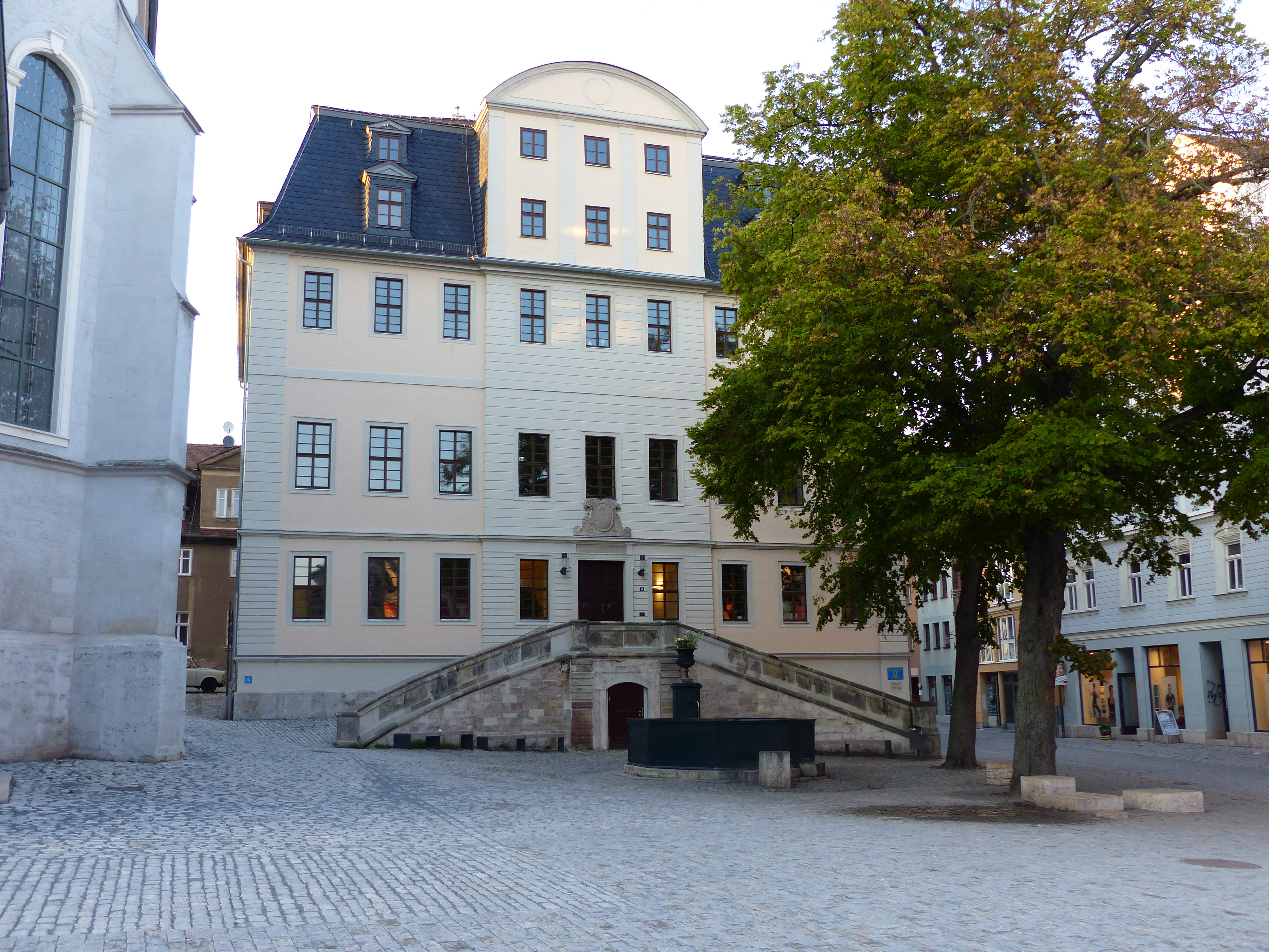 Herderplatz 14, Weimar